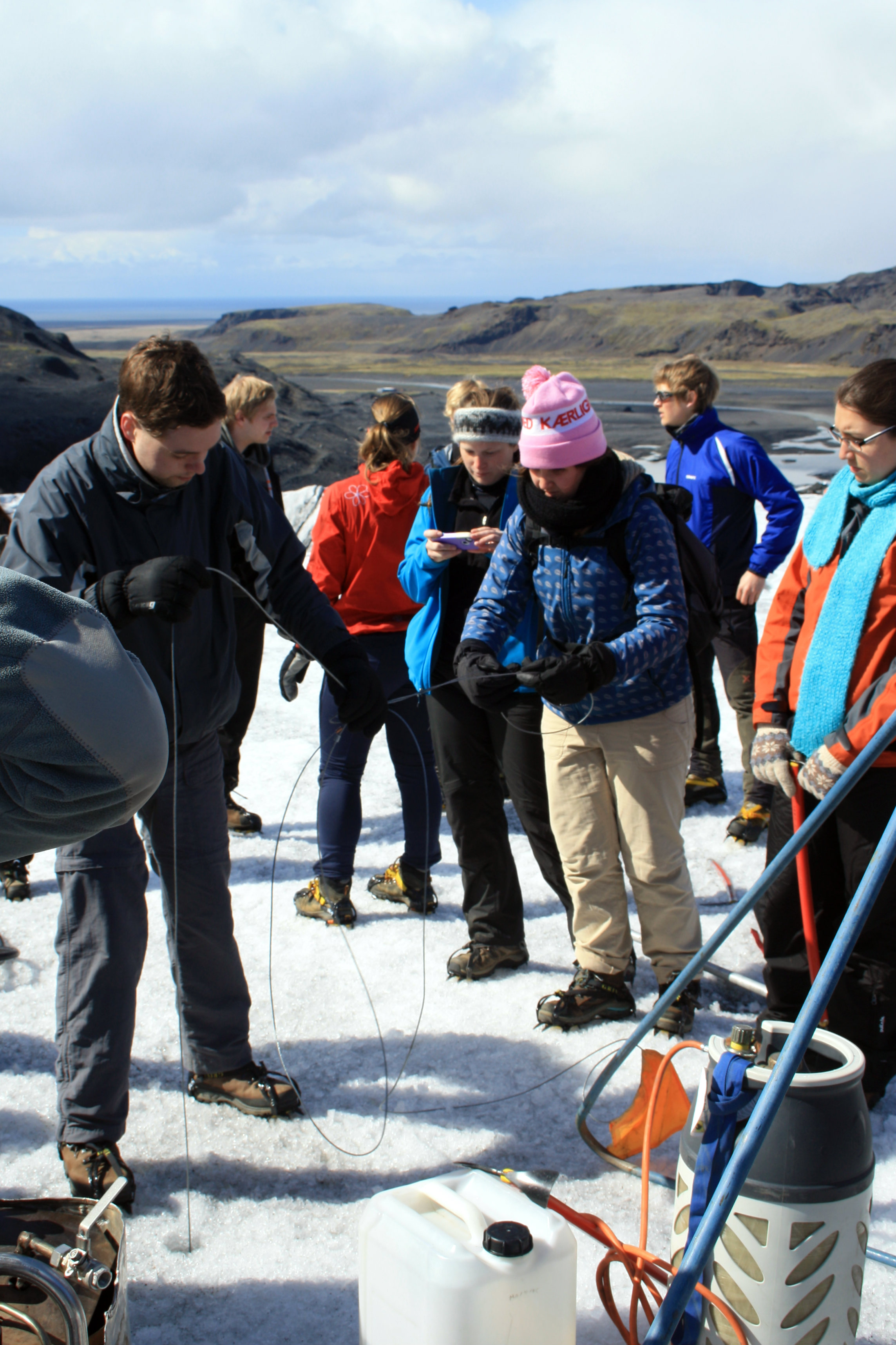 Ablatsiooni traadi liustiku jäässe puurimine.